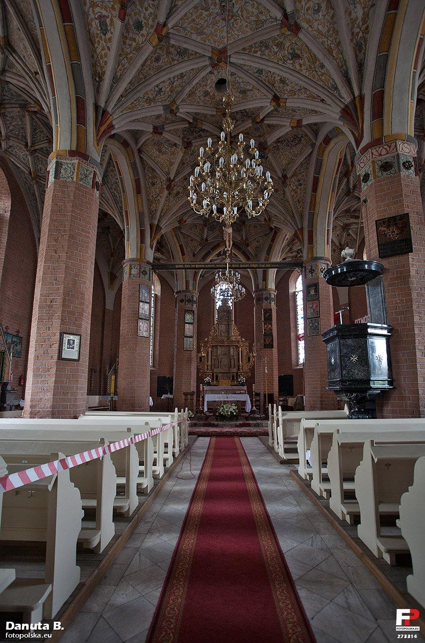 Wnętrze kościoła z wyremontowaną belką tęczową i amboną z czarnego marmuru. "Od lat 90. XX wieku trwają prace zmierzające do przywrócenia świątyni dawnego blasku. Przełożono m.in. dach, poddano konserwacji ołtarz, ambonę, witraże oraz sklepienie. Prowadzone są kolejne prace. Jest to możliwe nie tylko przez wzgląd na zaangażowanie strony polskiej, w tym szczególności władz kościelnych, konserwatorskich, samorządowych oraz osób prywatnych, ale też strony niemieckiej. Szczególnie aktywni w dziele konserwacji słońskiej świątyni i elementów jej wystroju pozostają przedstawiciele zakonu joannitów, którzy dopomogli w zdobyciu środków finansowych na poszczególne przedsięwzięcia oraz wspierają zadania pod względem merytorycznym i organizacyjnym" (LKZ)